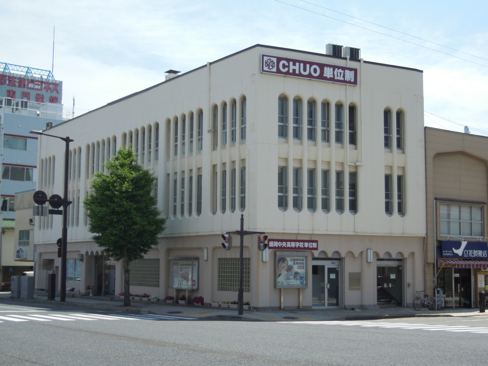 岩手県盛岡市にある盛岡中央高校盛岡駅前キャンパス